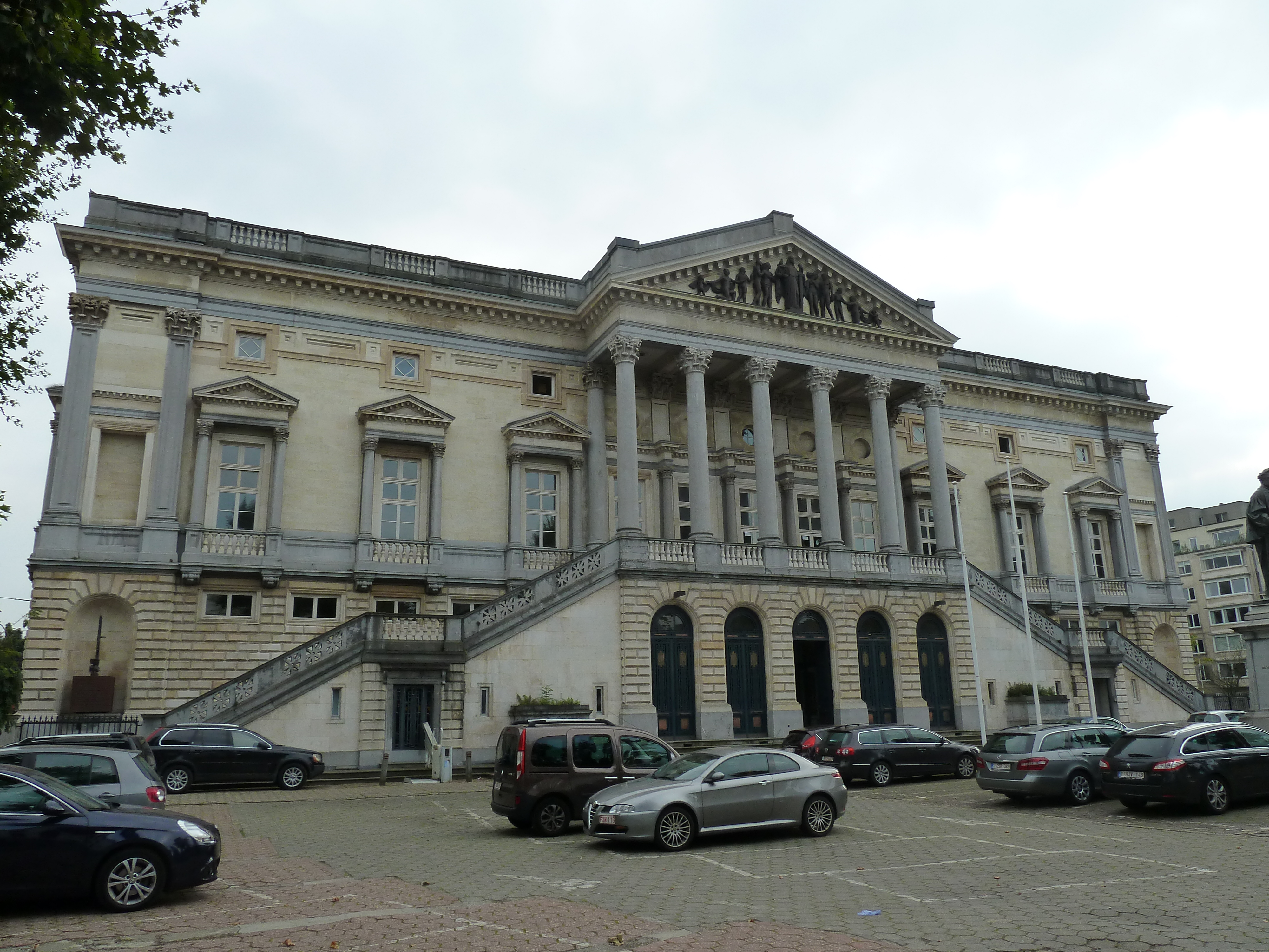 Oud Gerechtsgebouw aan Koophandelsplein, Gent, België